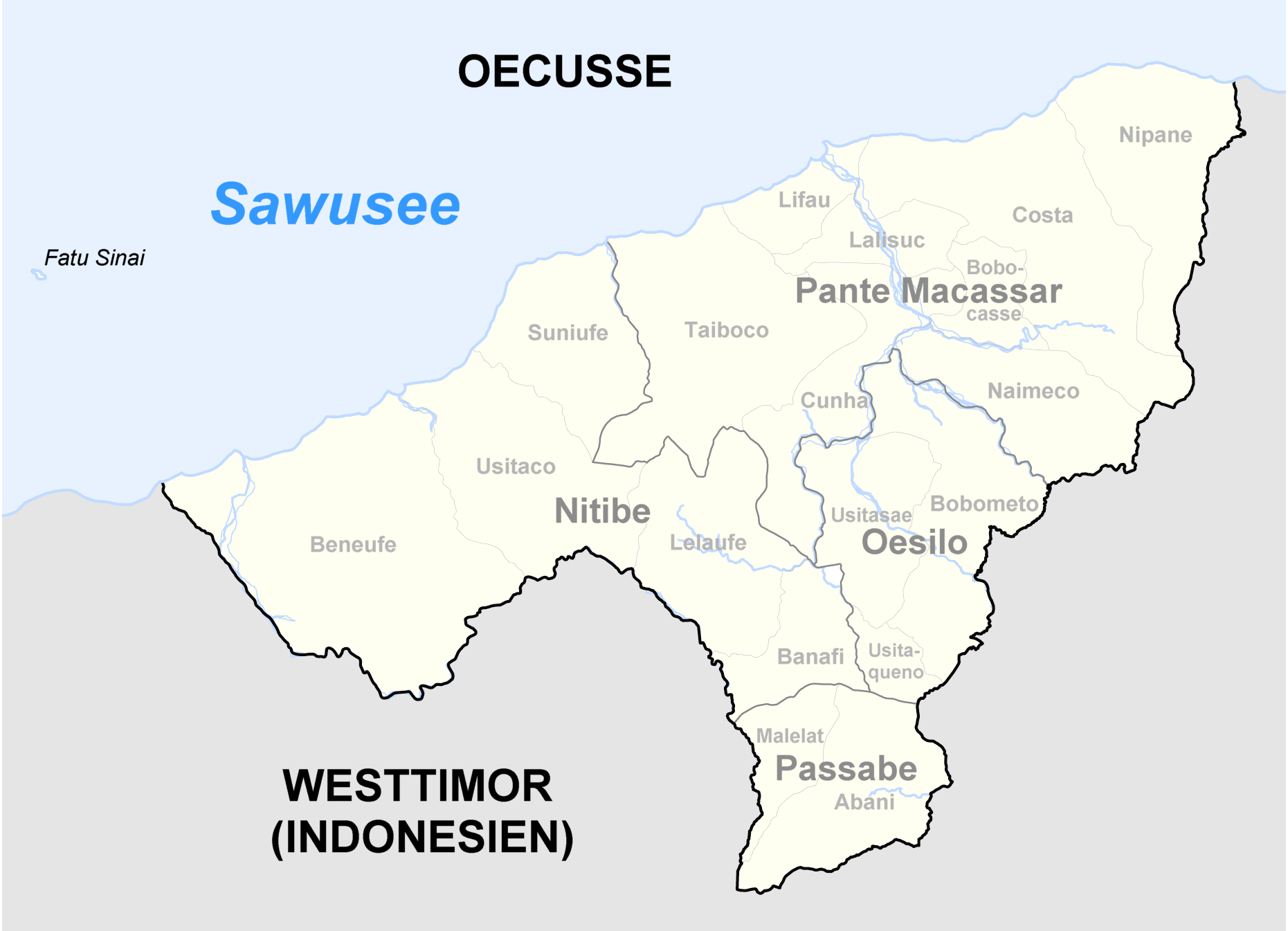 Sucos des Distrikts Oecussi-Ambeno/Osttimor nach der Neustrukturierung 2004